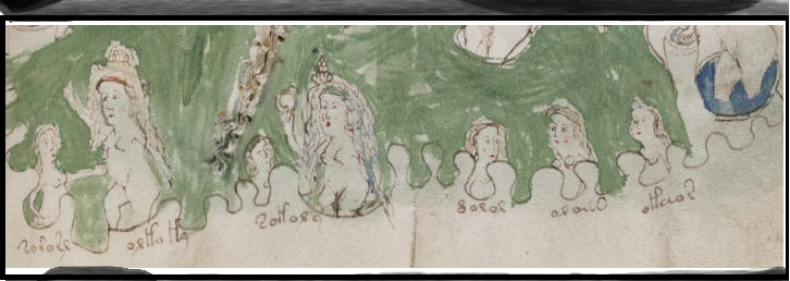 Detalhe da vinheta ni final da pagina 149 do Manuscrito Voynich